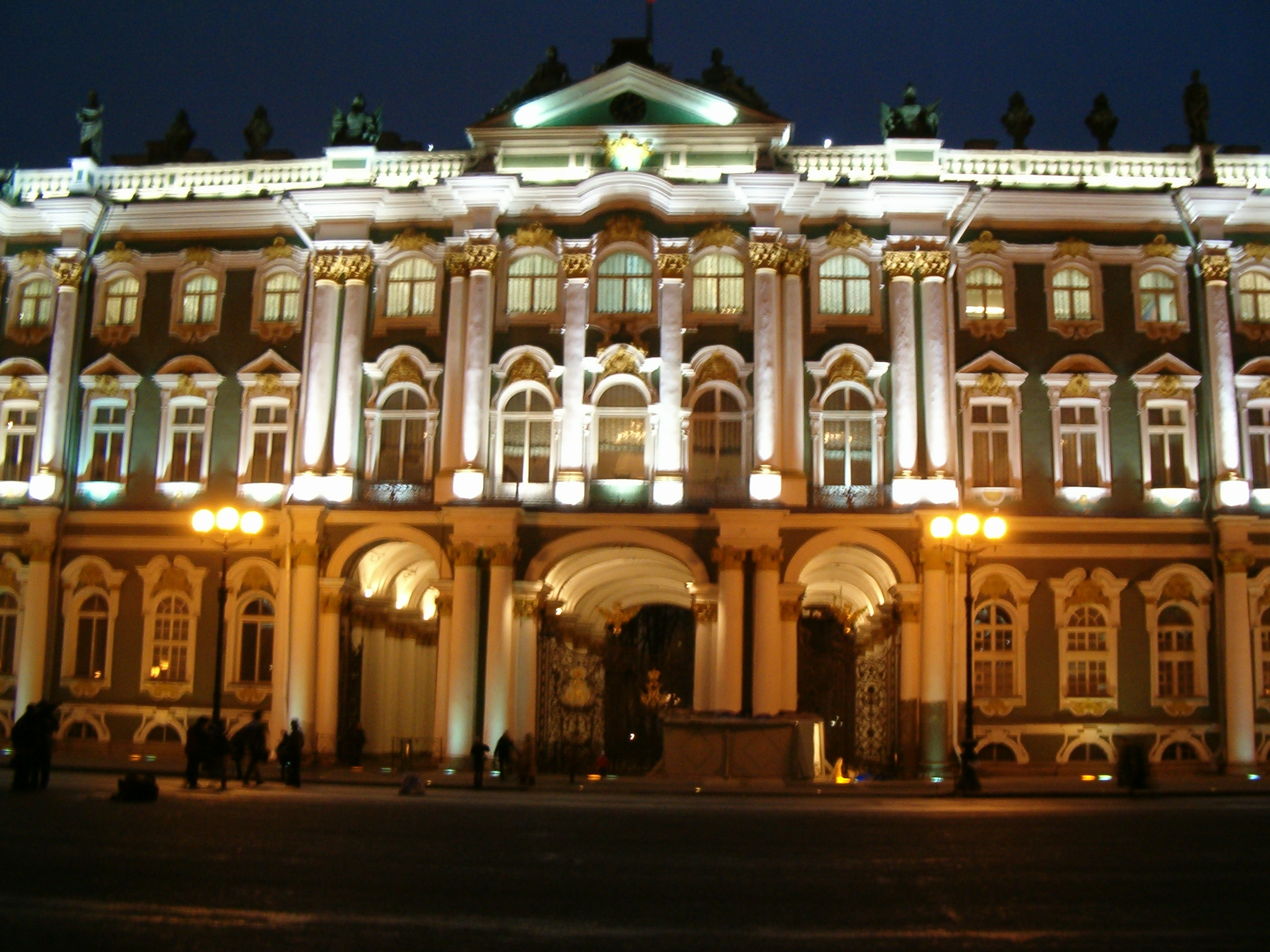 Ermitázs, Szentpétervár 2003